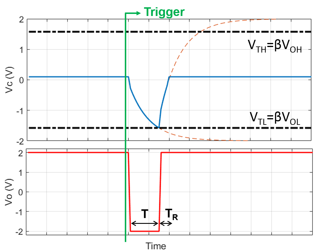 Risposta oscillatore monostabile